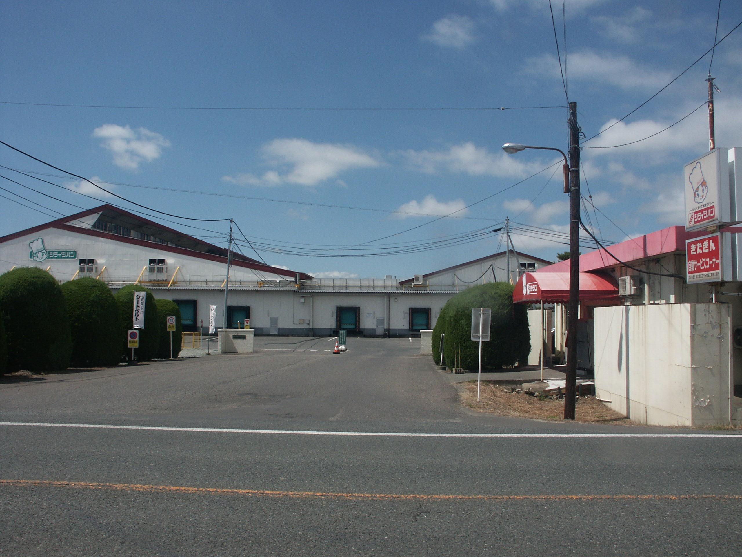 白石食品工業 本社工場